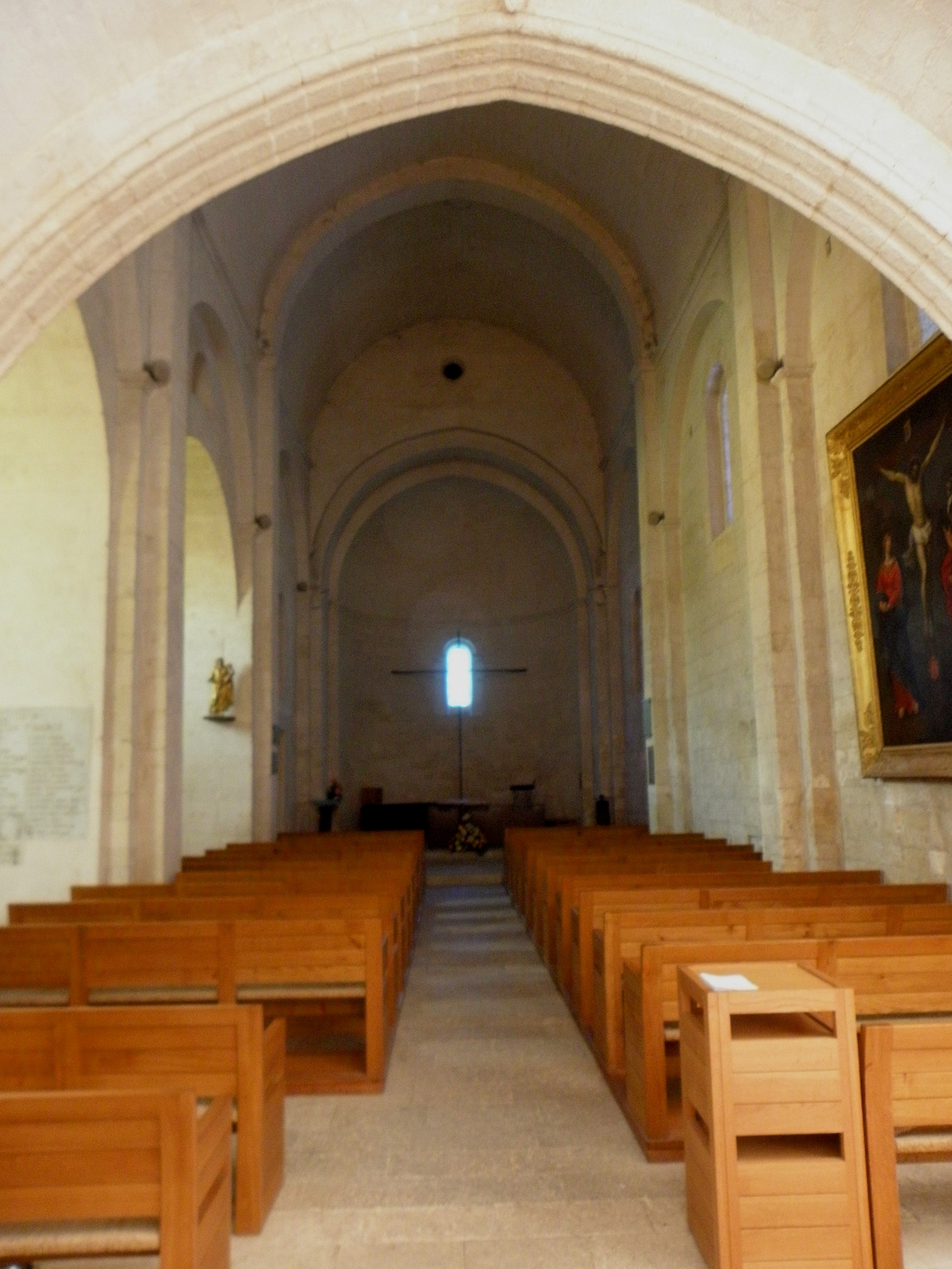 Église Saint-Jean-Baptiste de Castelnau-le-Lez (34). Intérieur.